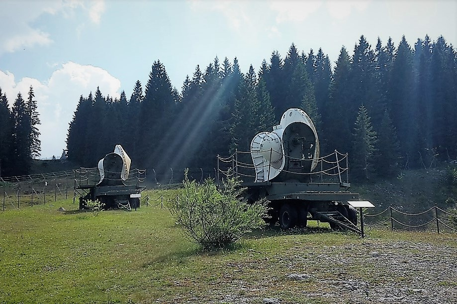 Base Tuono - radar TTR e TRR